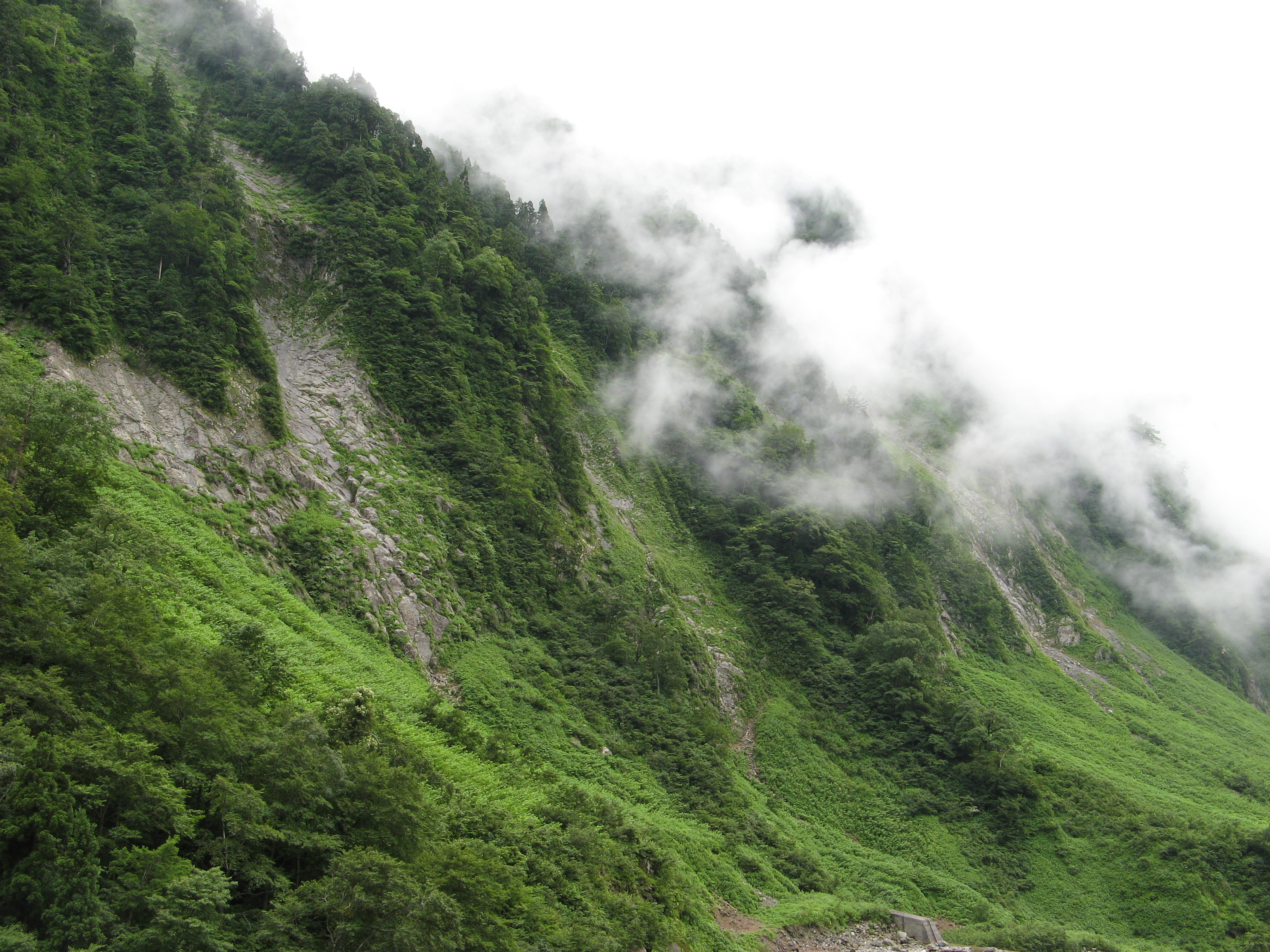 悪城の壁。富山県立山町。 / The Akushirono-kabe walls. Tateyama